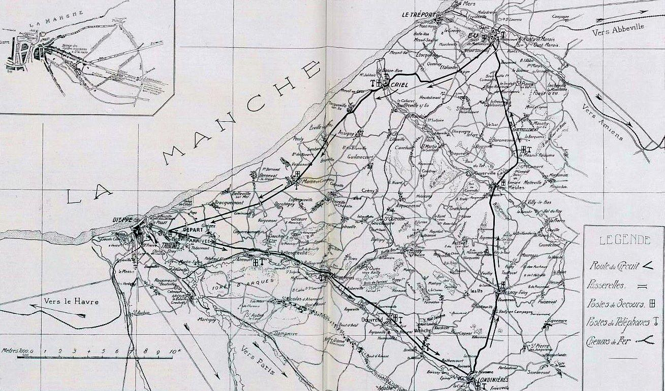 Plan du Circuit de Dieppe pour le Grand Prix de l'ACF 1908.